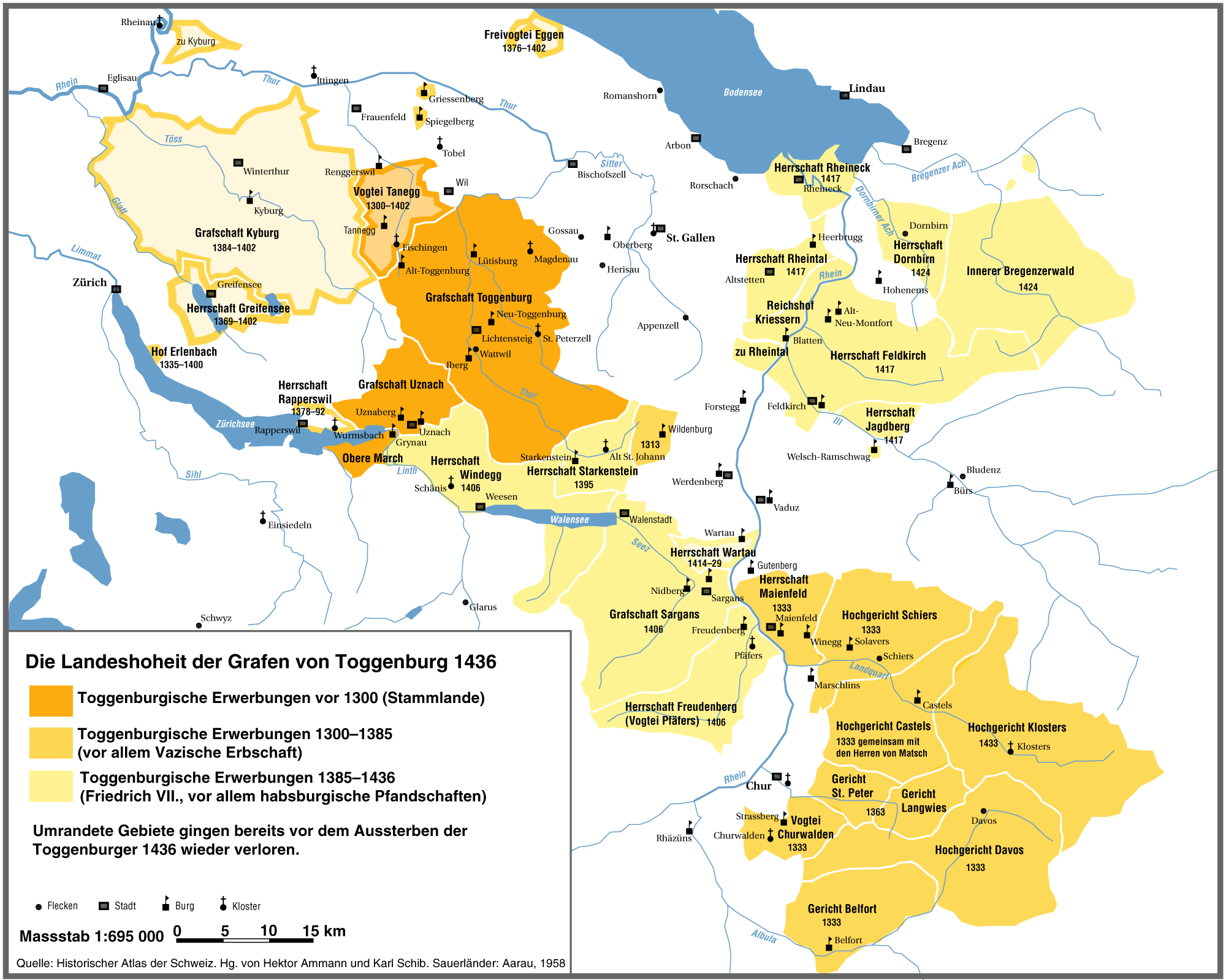 Landeshoheit der Grafen von Toggenburg 1436 beim Tod des letzten Toggenburgers